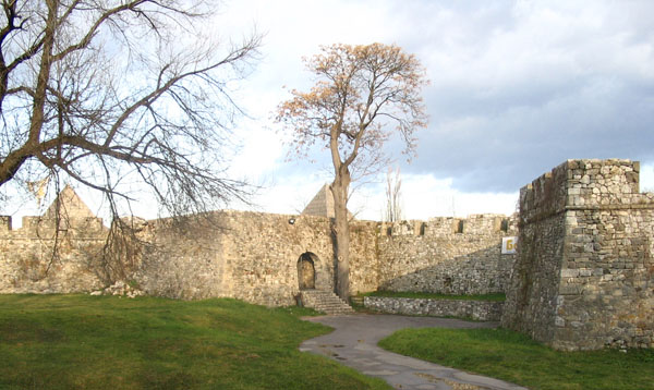 Тврђава Кастел, Бања Лука